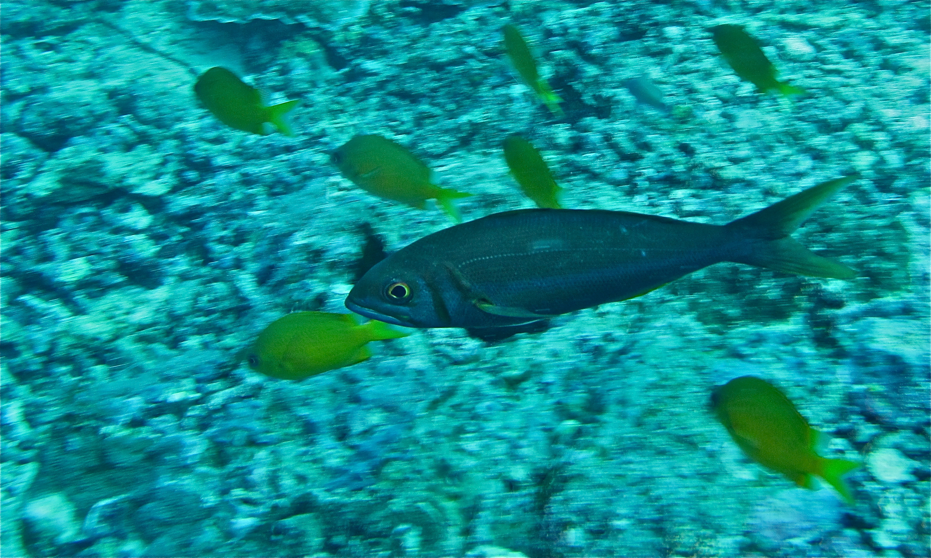 Barracuda Point, Sipadan, Sabah, MALAYSIA